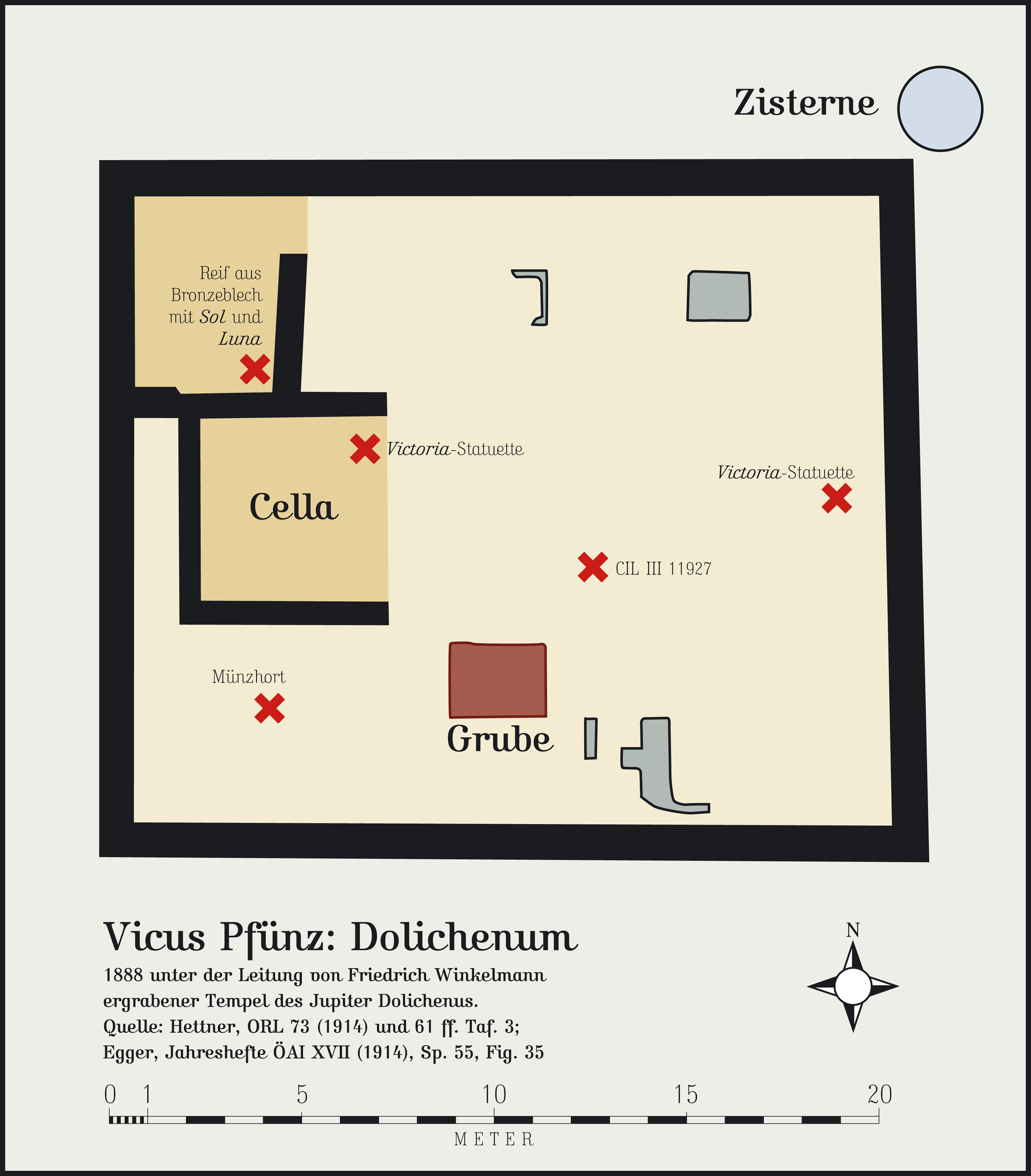 Das Dolichenum von Pfünz wurde 1888 ergraben. Der fast rechteckige Tempel besaß eine Länge von 21,10 und 21,45 Metern und eine Breite von 18 und 18,20 Metern. Es barg noch viele wertvolle Funde, die beim Untergang des antiken Vetoniana in situ erhalten blieben.